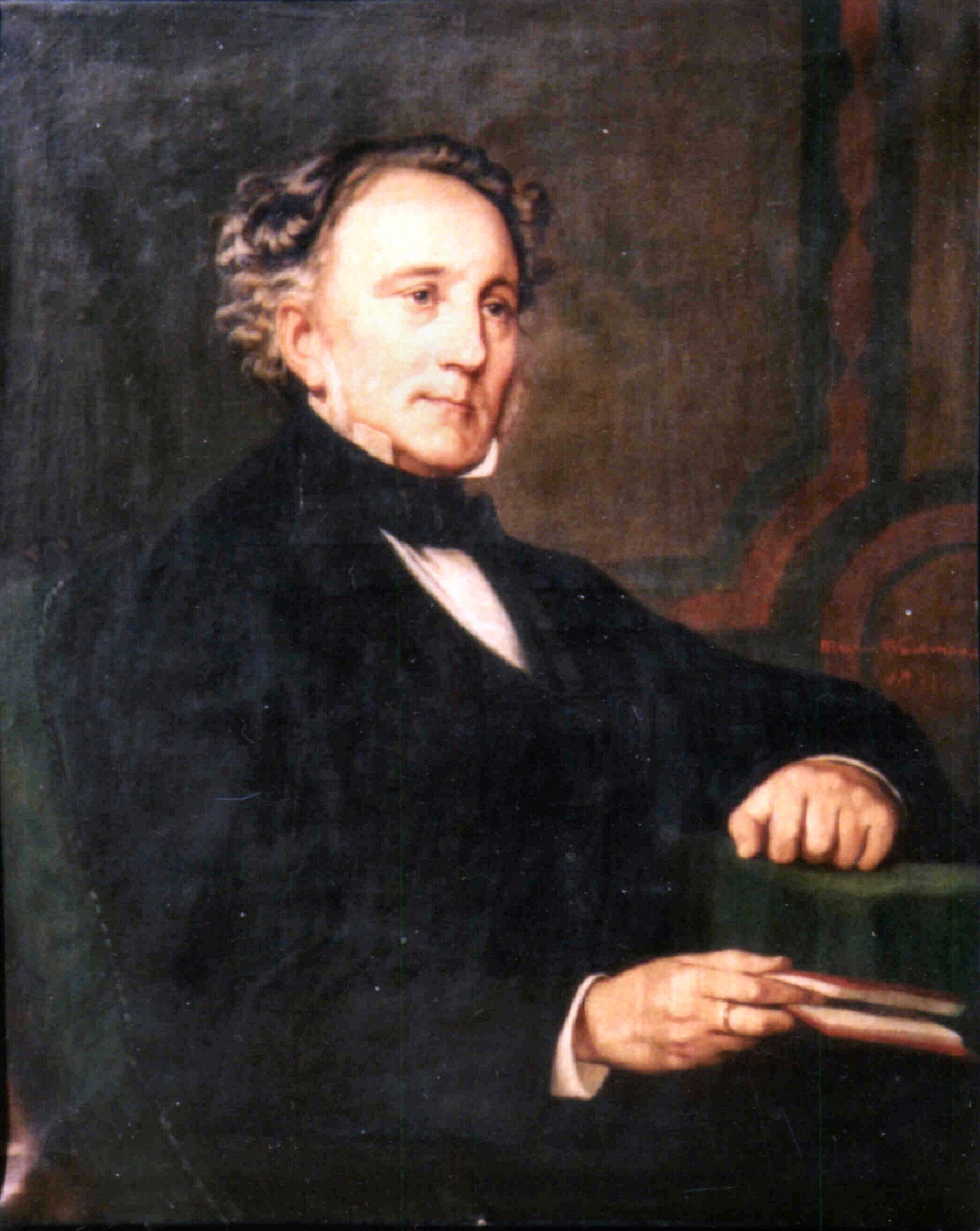 Oelbild von Hermann von Beckerath in Familienbesitz, Photo selber gemacht